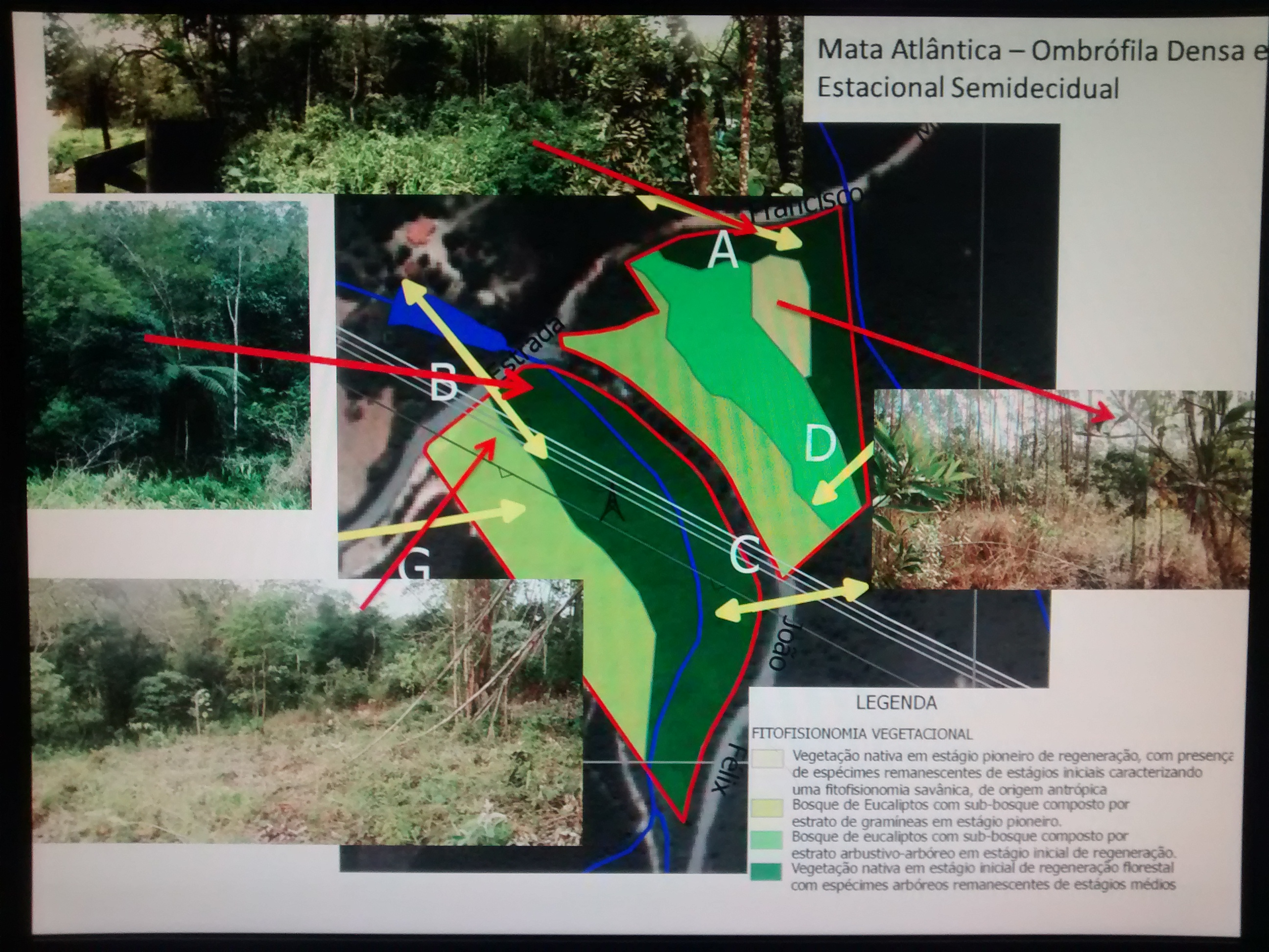 Municipal Natural Park Cajamar - Flora